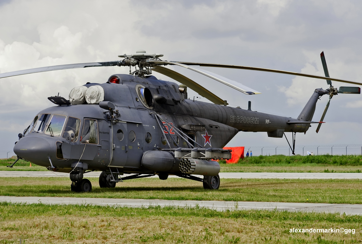 Mi-8 amtsh (52)